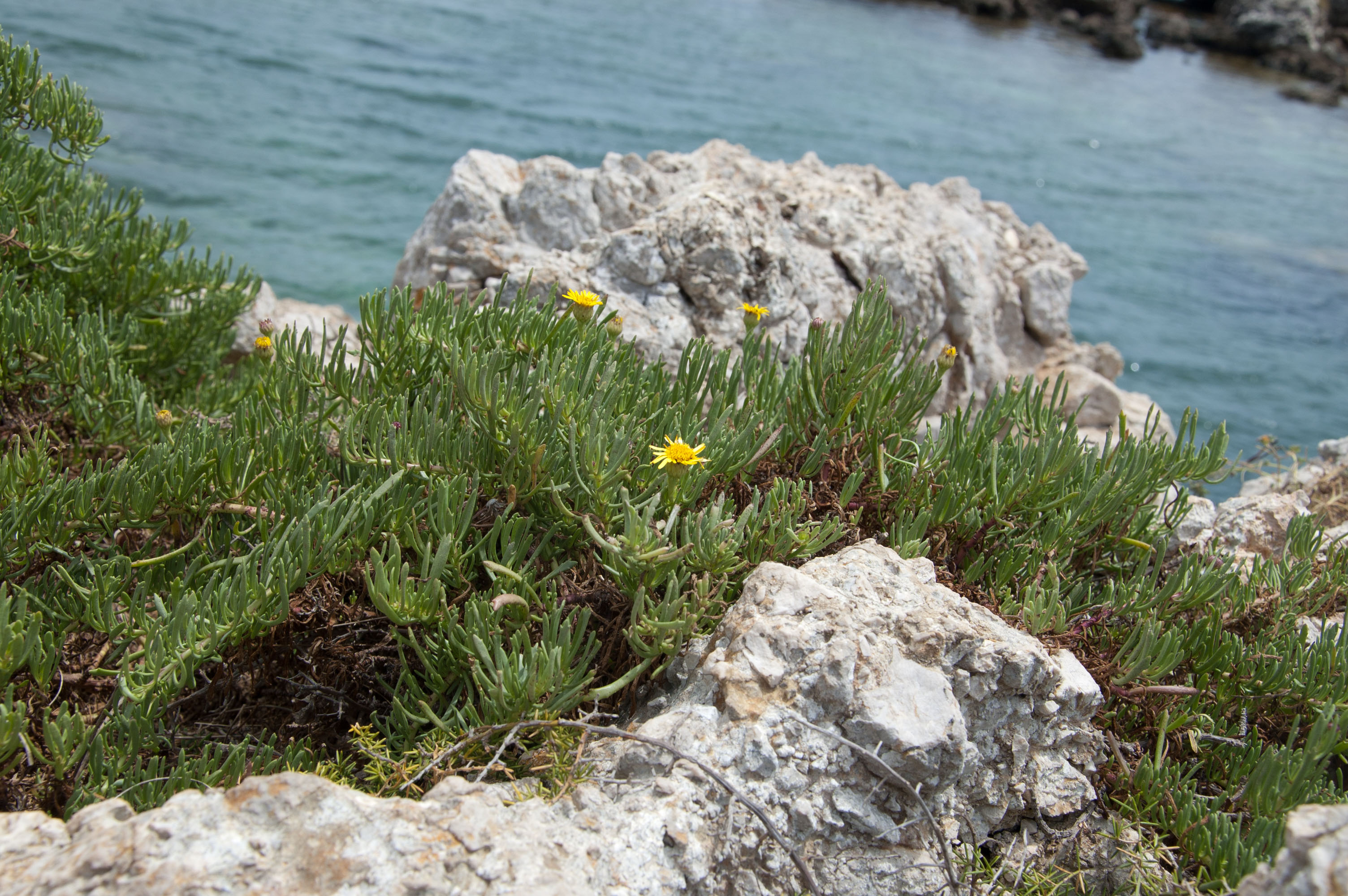 Limbarda crithmoides (L.) Dumort. Favignana, Sicily